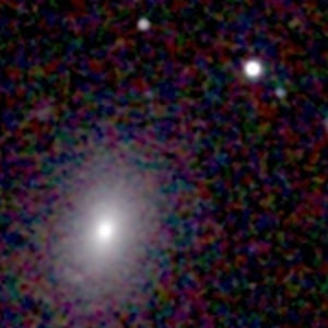 Galaxy NGC 50